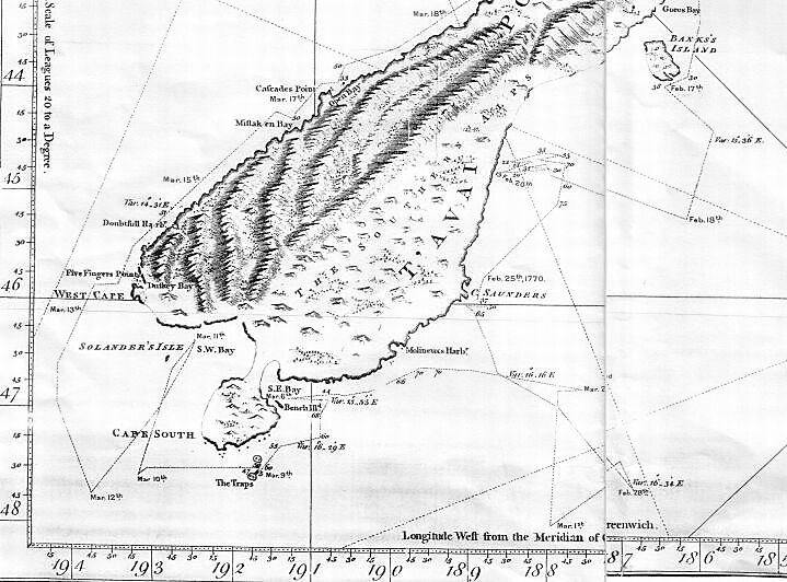 Fragmento de la ruta del HMB Endeavour de la mitad sur de la Isla Sur de Nueva Zelanda. Fragmento del grabado de John Bayly del mapa de Nueva Zelanda realizado por James Cook e Isaac Smith, 1769-70, publicado en la edición oficial de los diarios por John Hawkeswh en 1773.